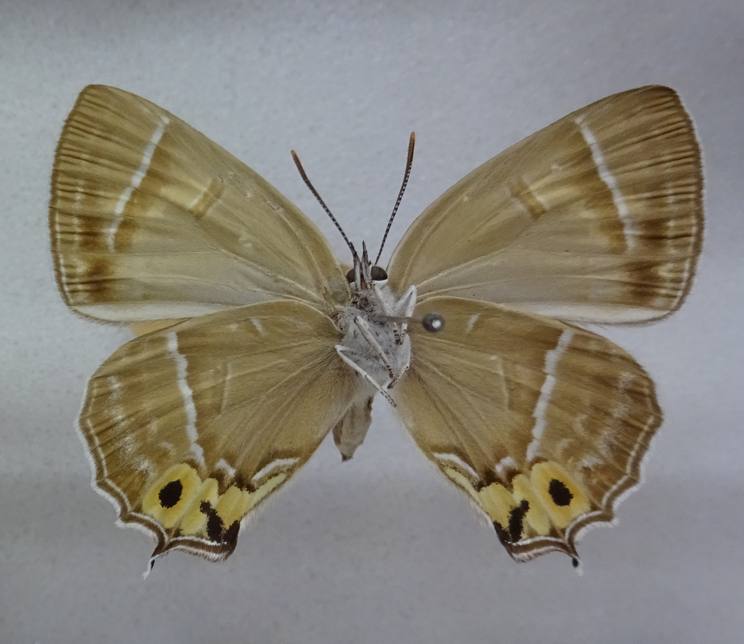 メスアカミドリシジミ